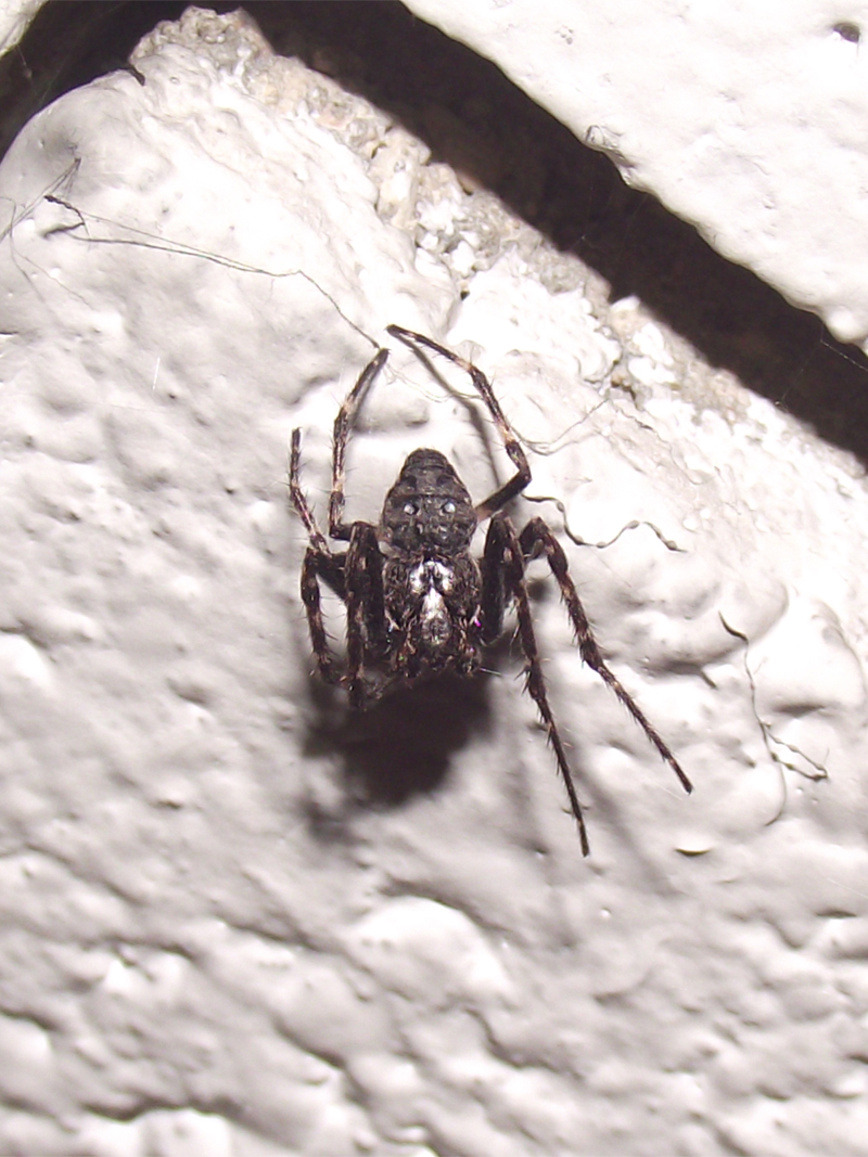 Araignée "faisant la morte".